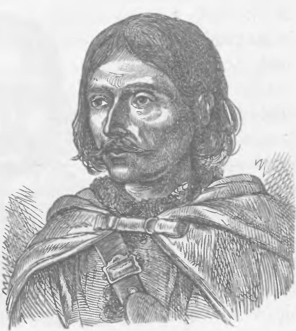 Ilustracja do „Illustrowanego przewodnika do Tatr, Pienin i Szczawnic” Walerego Eljasza-Radzikowskiego. Oryginalny opis:„Jędrzej Wala, przewodnik po Tatrach”.